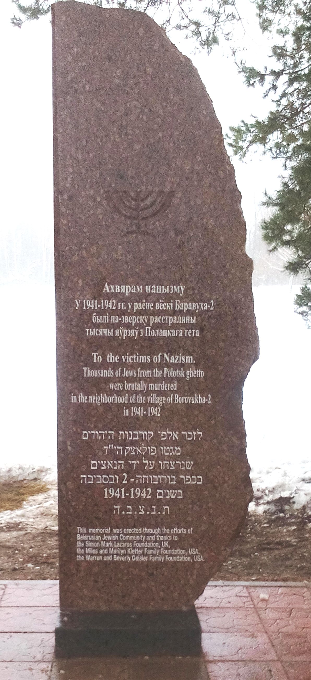 Памятник убитым нацистами евреям - недалеко от одного из мест массового захоронения узников гетто в поселке Боровуха-2 возле Полоцка. Установлен в ноябре 2016 года. Находится около дома № 182 на улице Космонавтов.